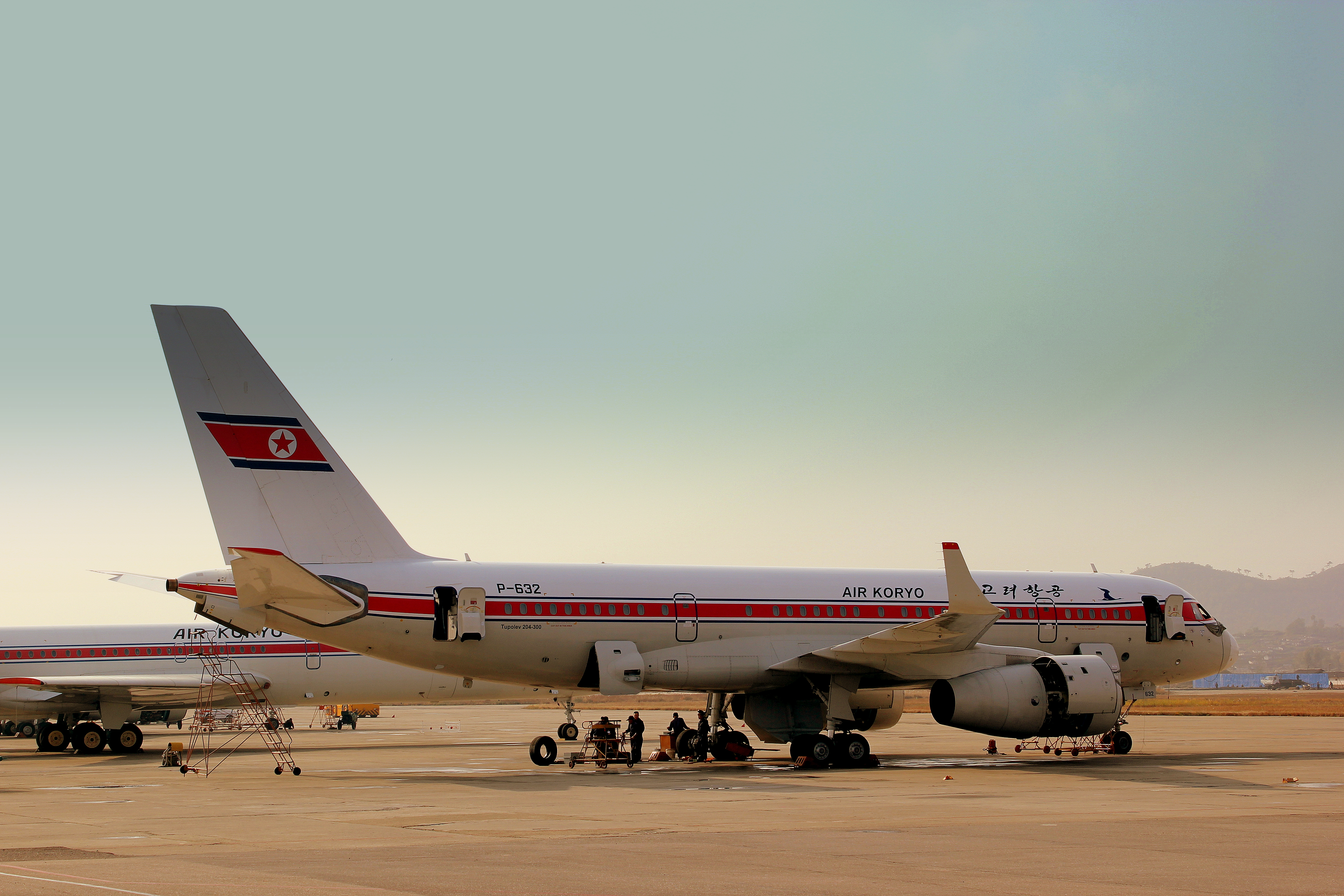 AIR KORYO P632 TUPOLEV TU204-100 AT PYONGYANG SUNAN AIRPORT DPR KOREA OCT 2012